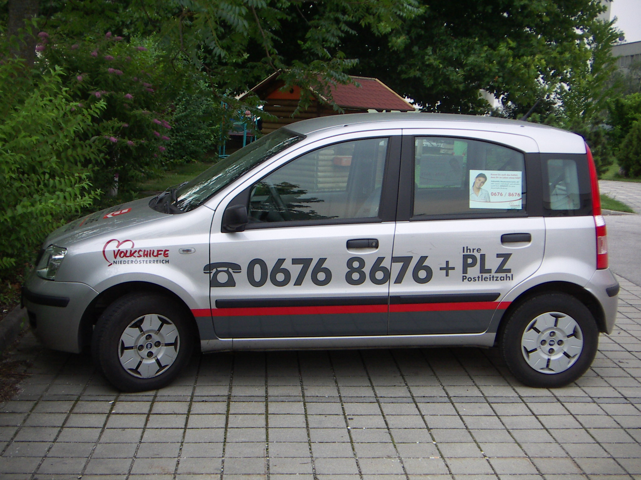 Volkshilfe Niederösterreich in Wiener Neustadt, Auto der Mobilen Hauskrankenpflege